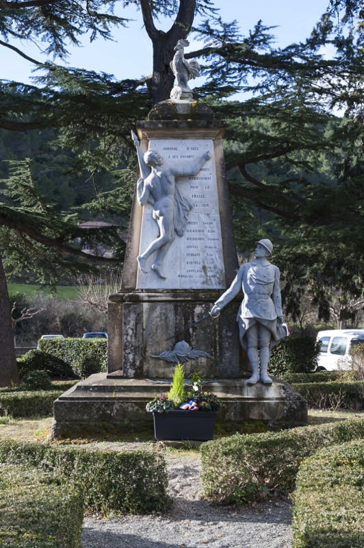 Monument aux morts - Archives départementales de l’Hérault - FRAD034-2637W-Agel-00001